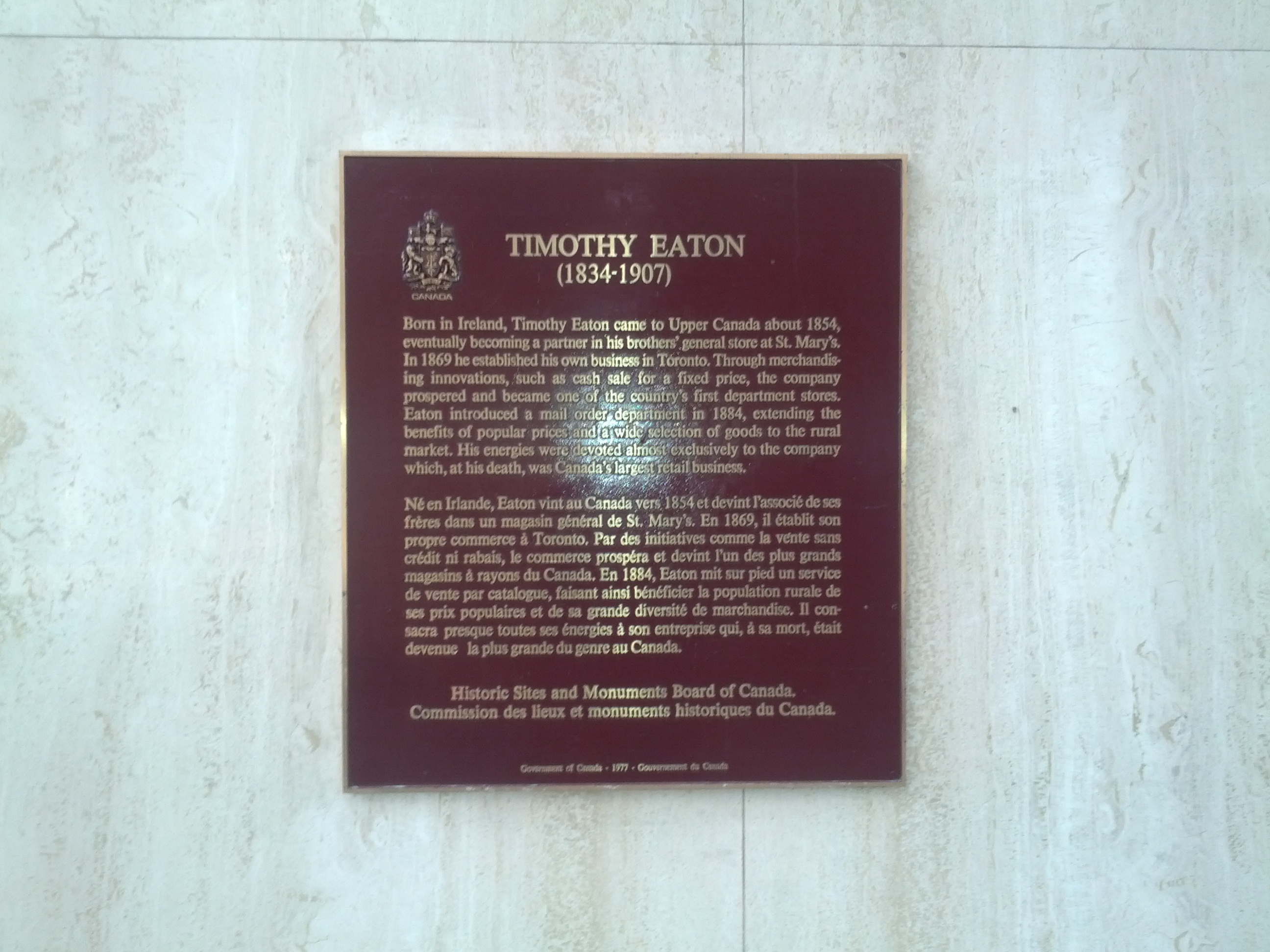 Placa em Toronto.